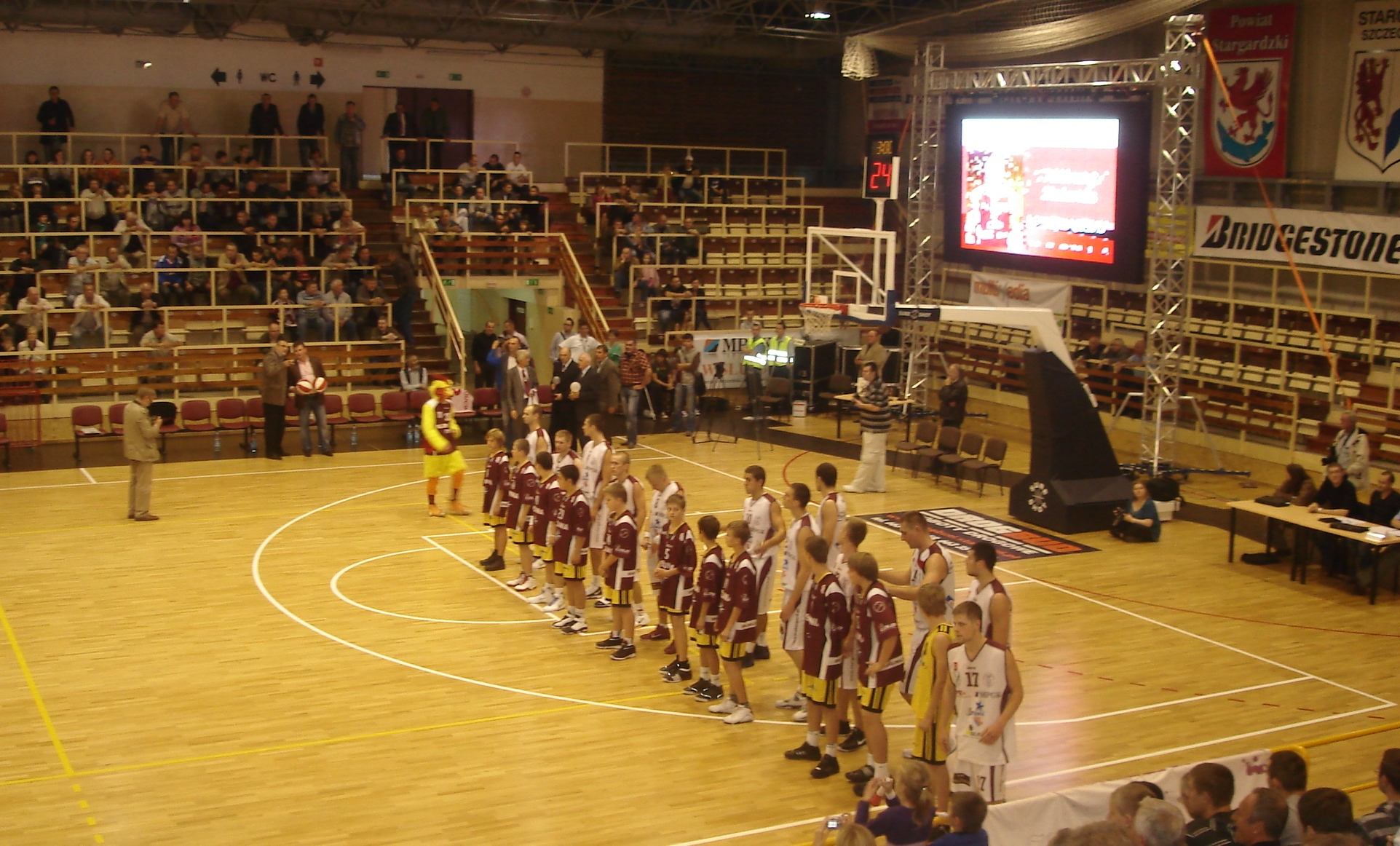 Stargard Szczeciński, 2010 r. Mecz Spójni w I lidze z Radex Szczecin